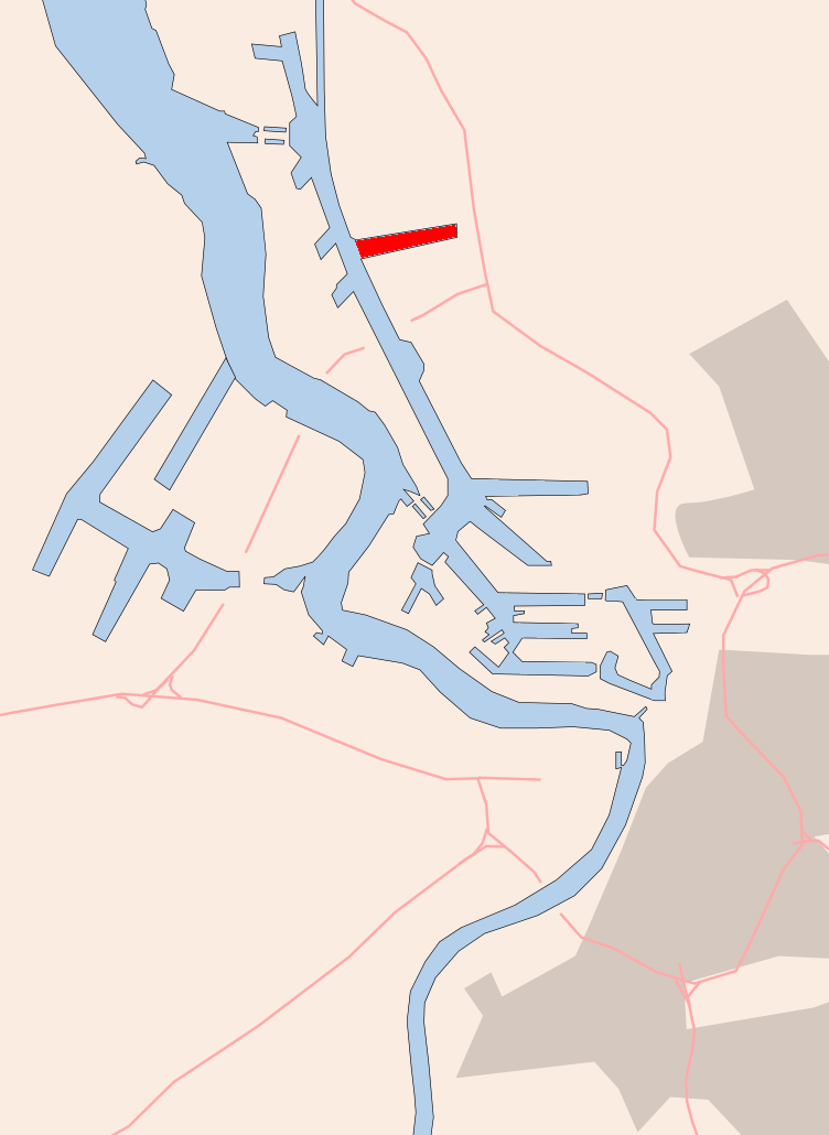 Antwerp , Delwaidedok